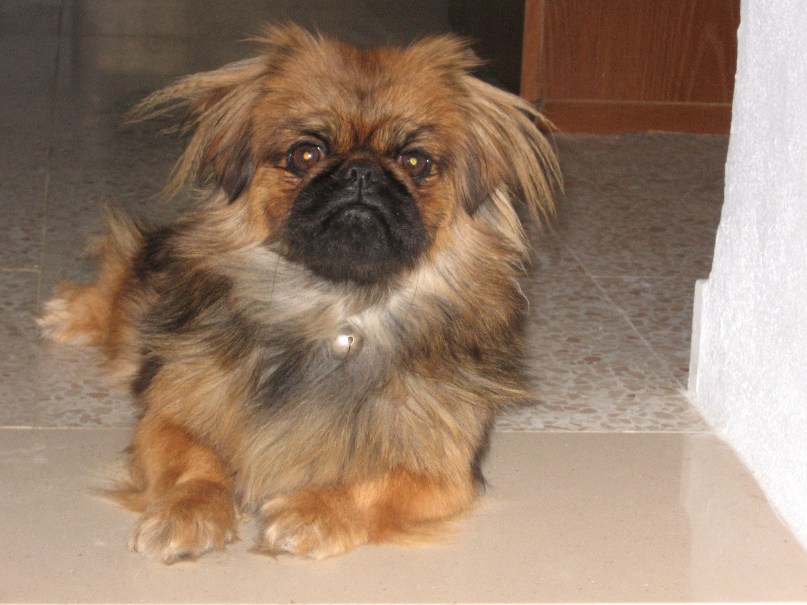 Moppy. Perra pequines de 1 año de edad